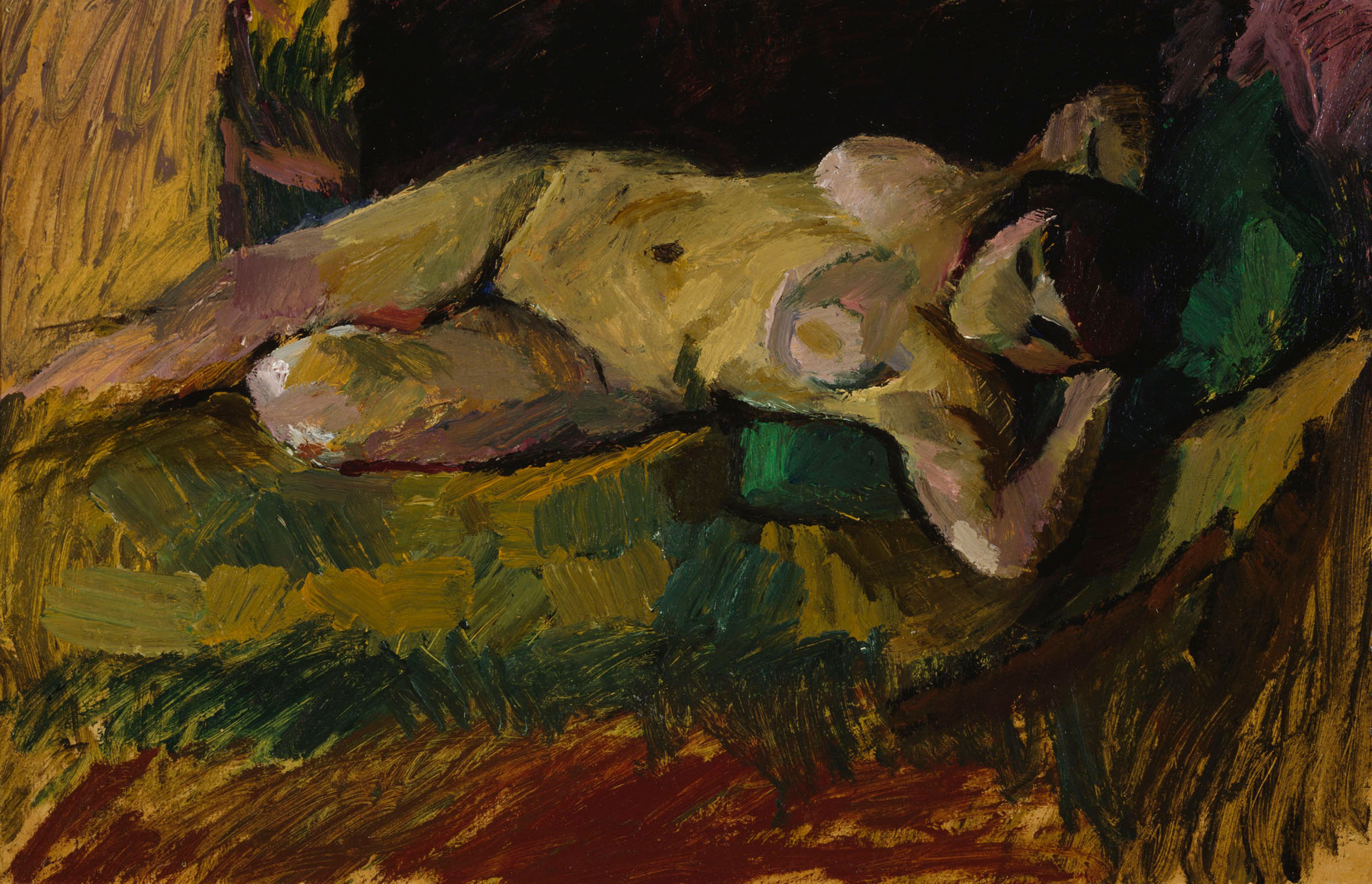 Valle Rosenbergin maalaus Alaston.